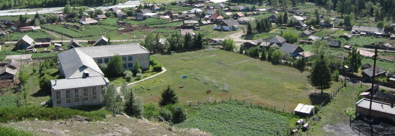 Школа